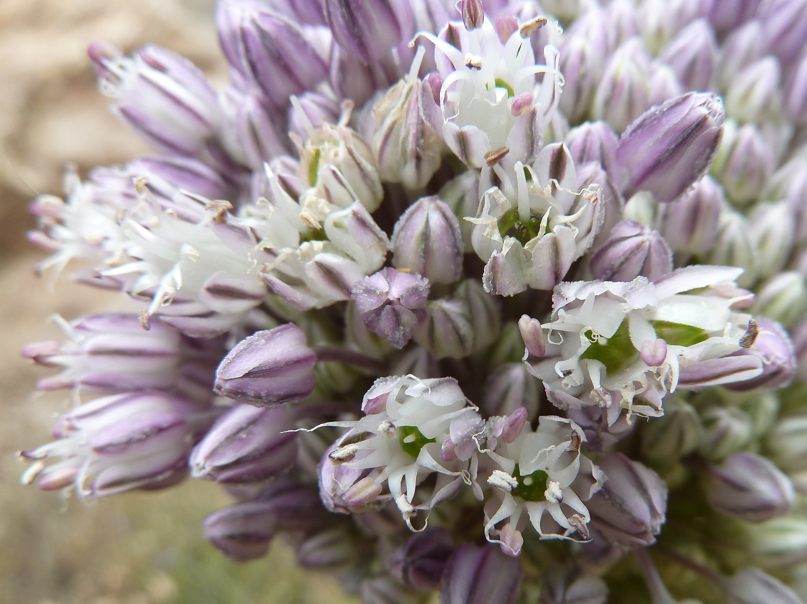 Allium ampeloprasum - (Ajo porro, Puerro silvestre) - inflorescencia, detalle - Cabezo de Pallarés, Albatera (Provincia de Alicante, España).